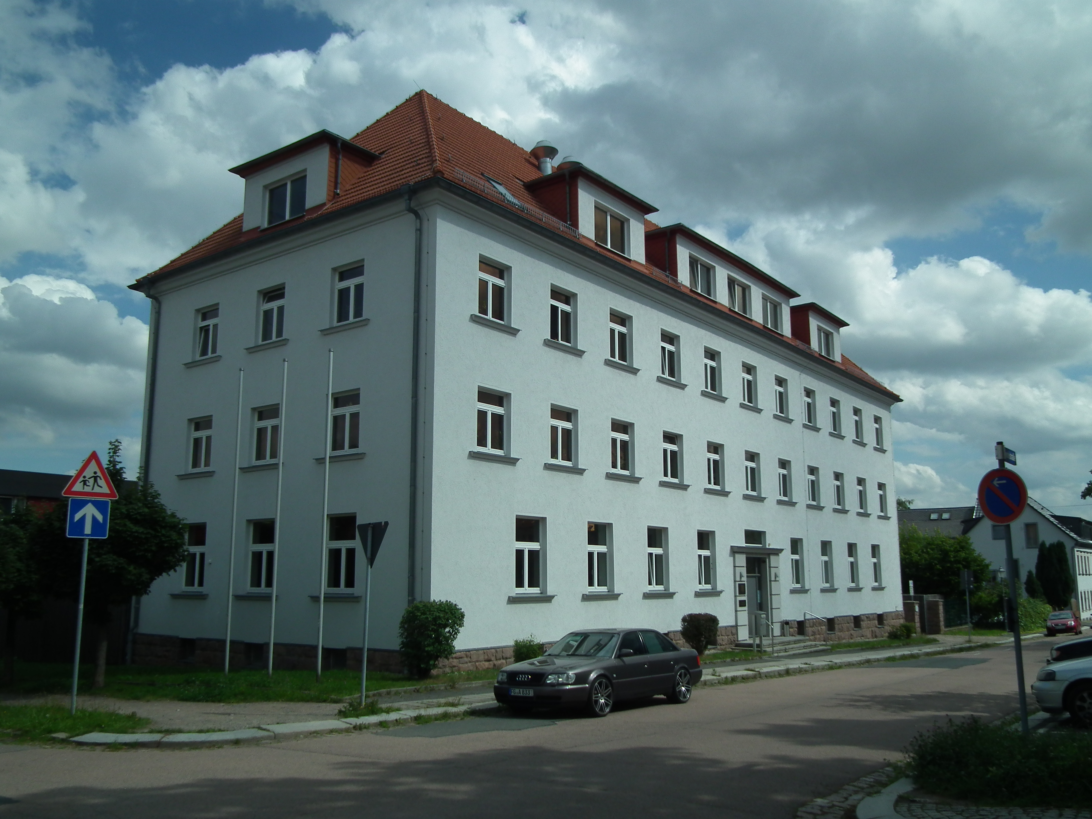 Hainichen